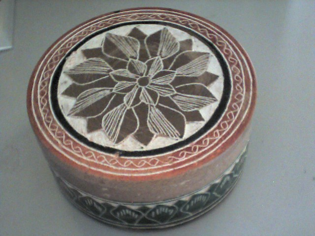 Artesanato_Ouro_Preto_Mg_Brasil